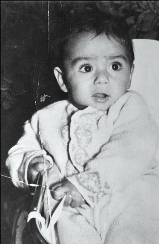 Саддам Хусейн в детстве